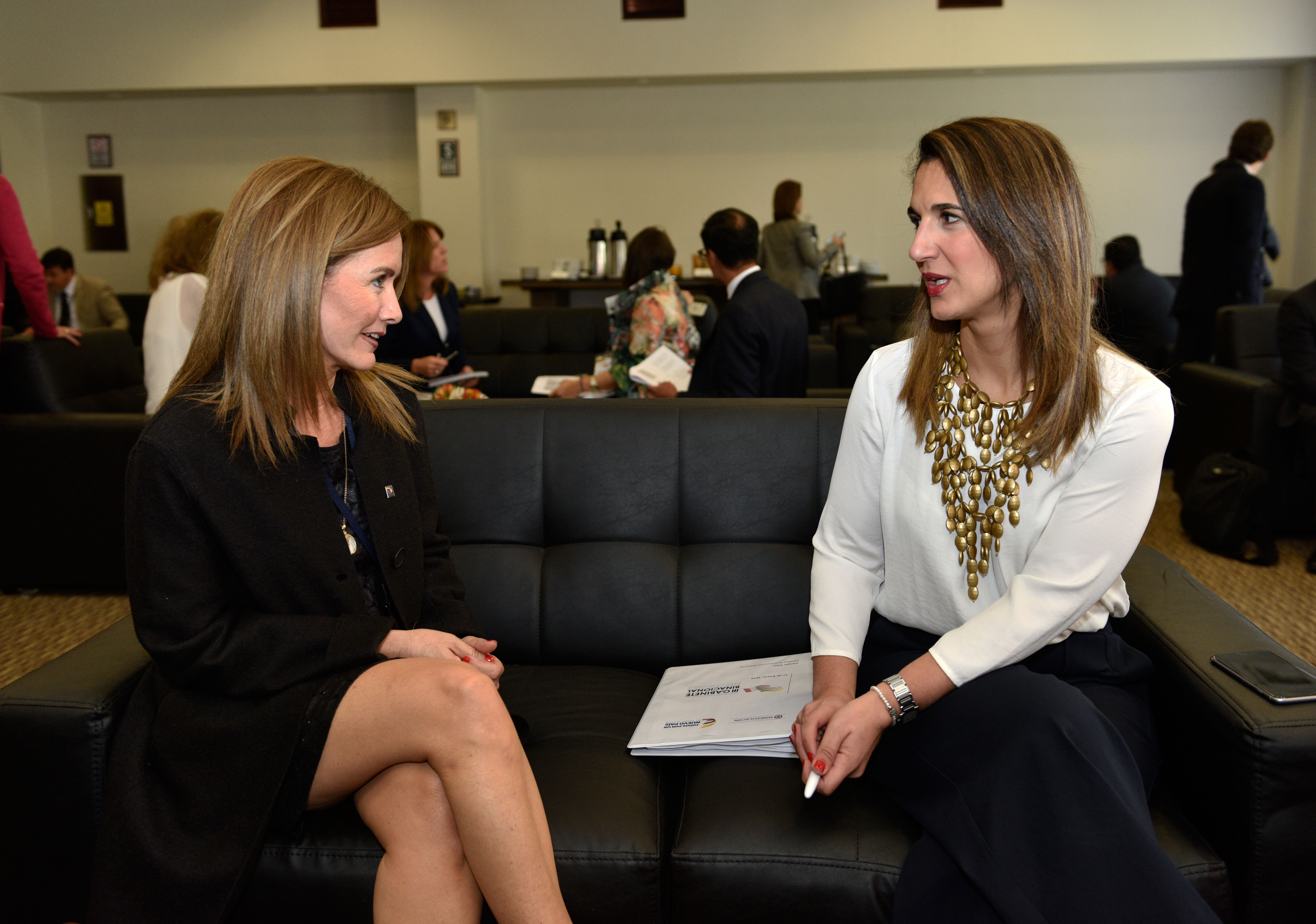 Reuniones bilaterales de Ministros de Perú y Colombia, el marco del Encuentro Presidencial y III Gabinete Binacional Perú – Colombia, Arequipa. En la imagen, Marilú Martens (Ministra Educación de Perú) y Yaneth Giha ((Ministra Educación de Colombia) .